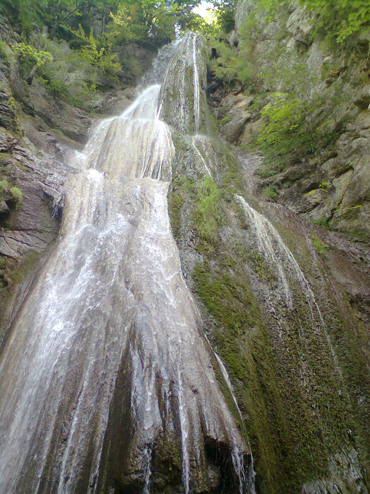 Môtiers cascade 090814